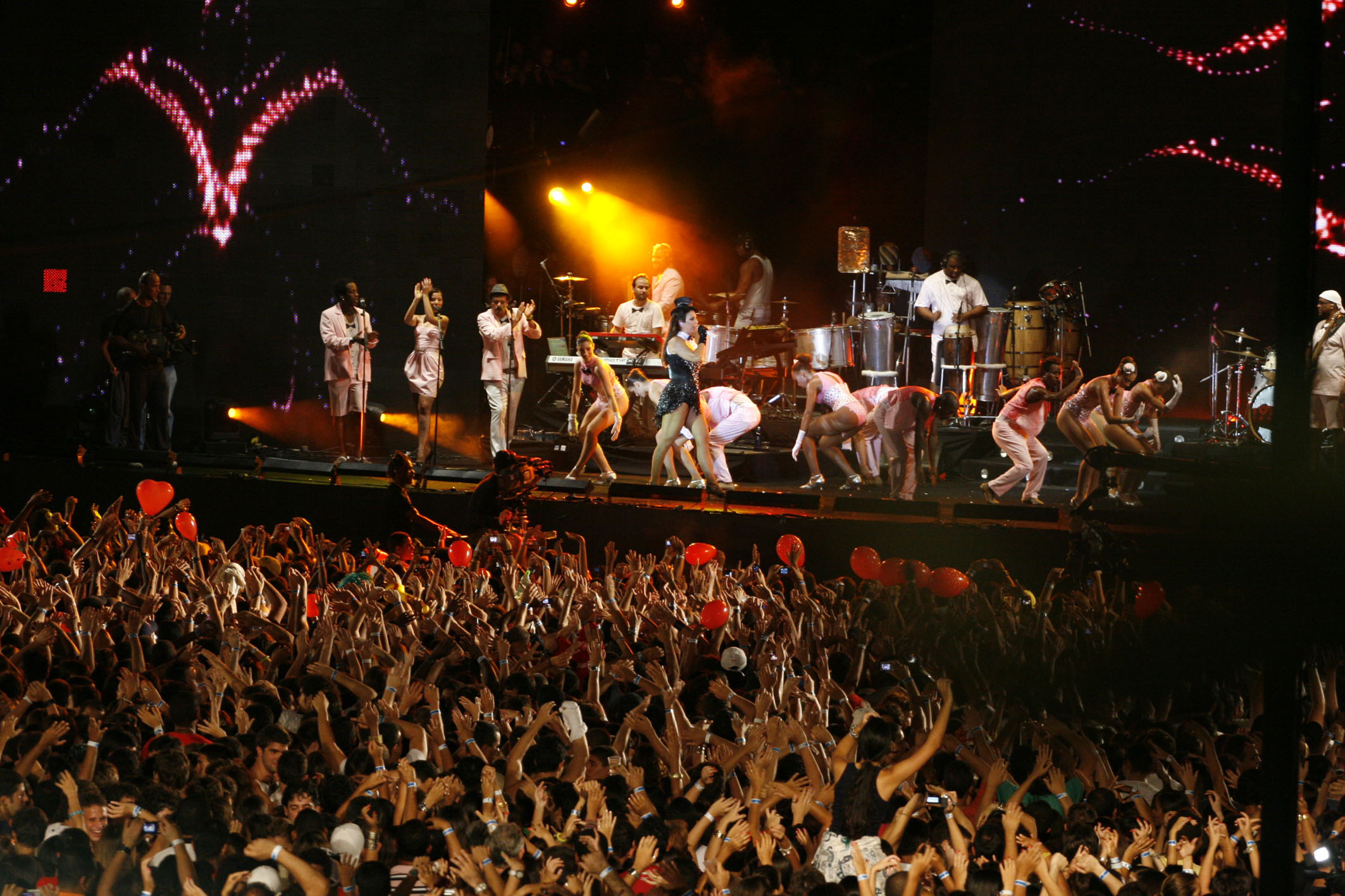 Governador Jaques Wagner assiste shows no Festival de Verão no Parque de Exposições de Salvador Foto: Roberto Viana/AGECOM